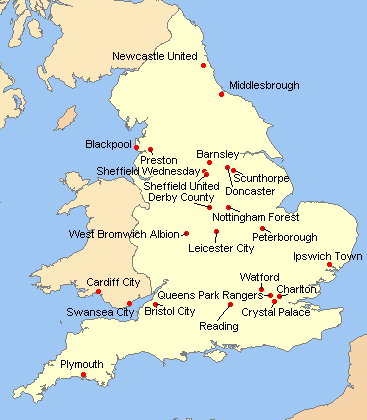 Répartition des clubs en FL Championship 2009-2010.